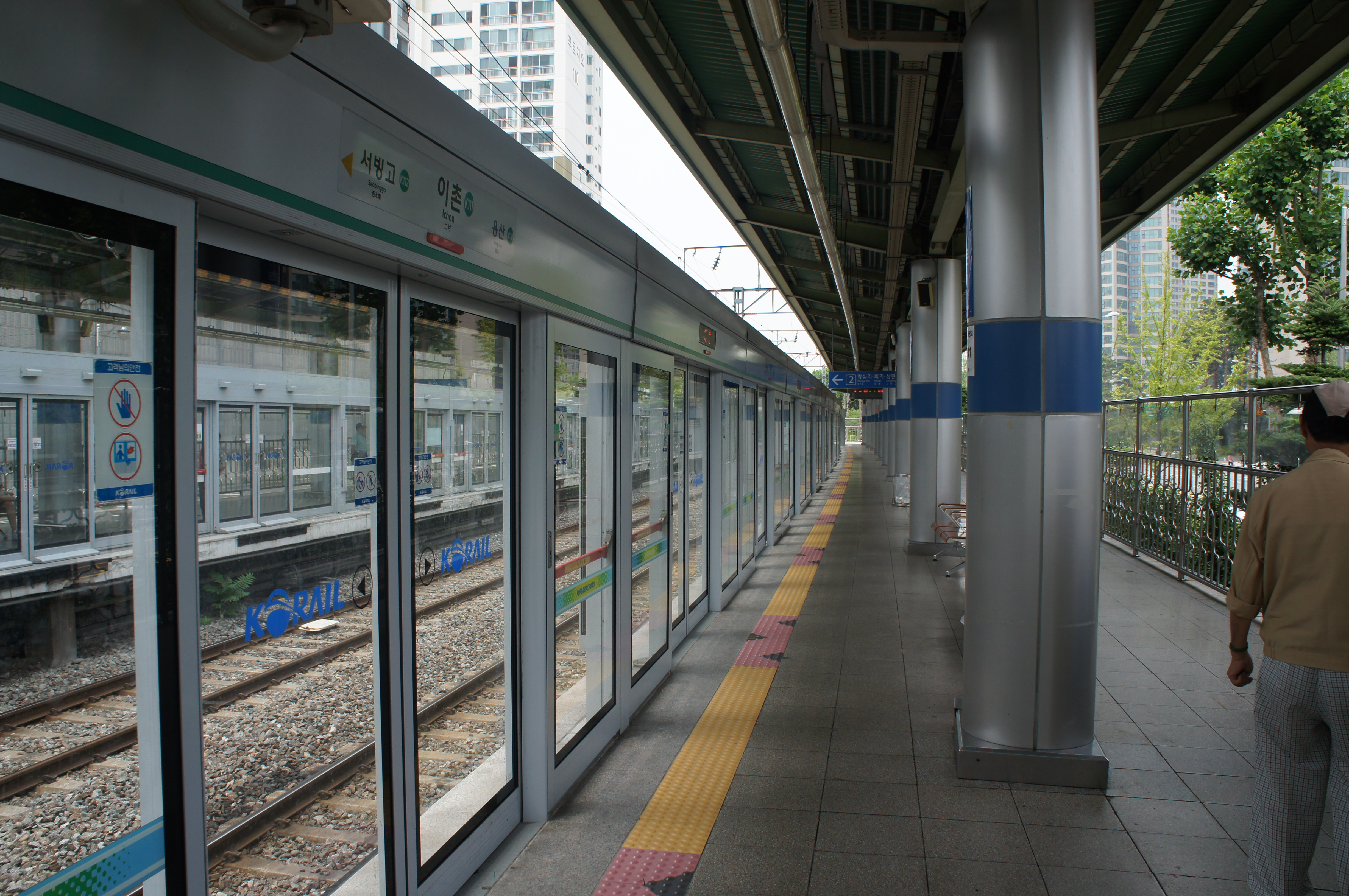 중앙선 이촌역 승강장